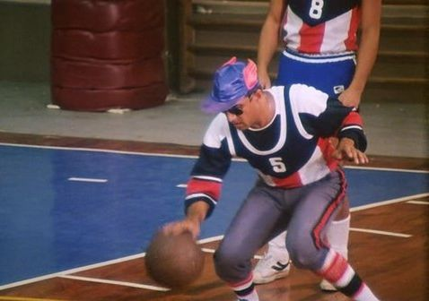 Pallacanestro (Cantu)